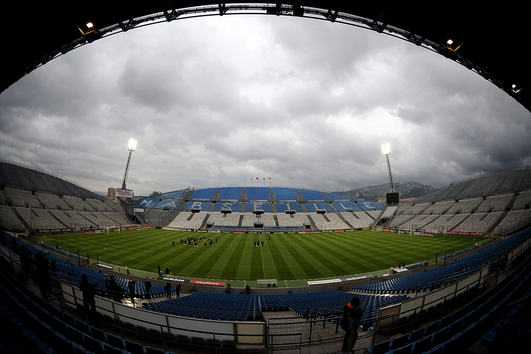 Stade Vélodrome